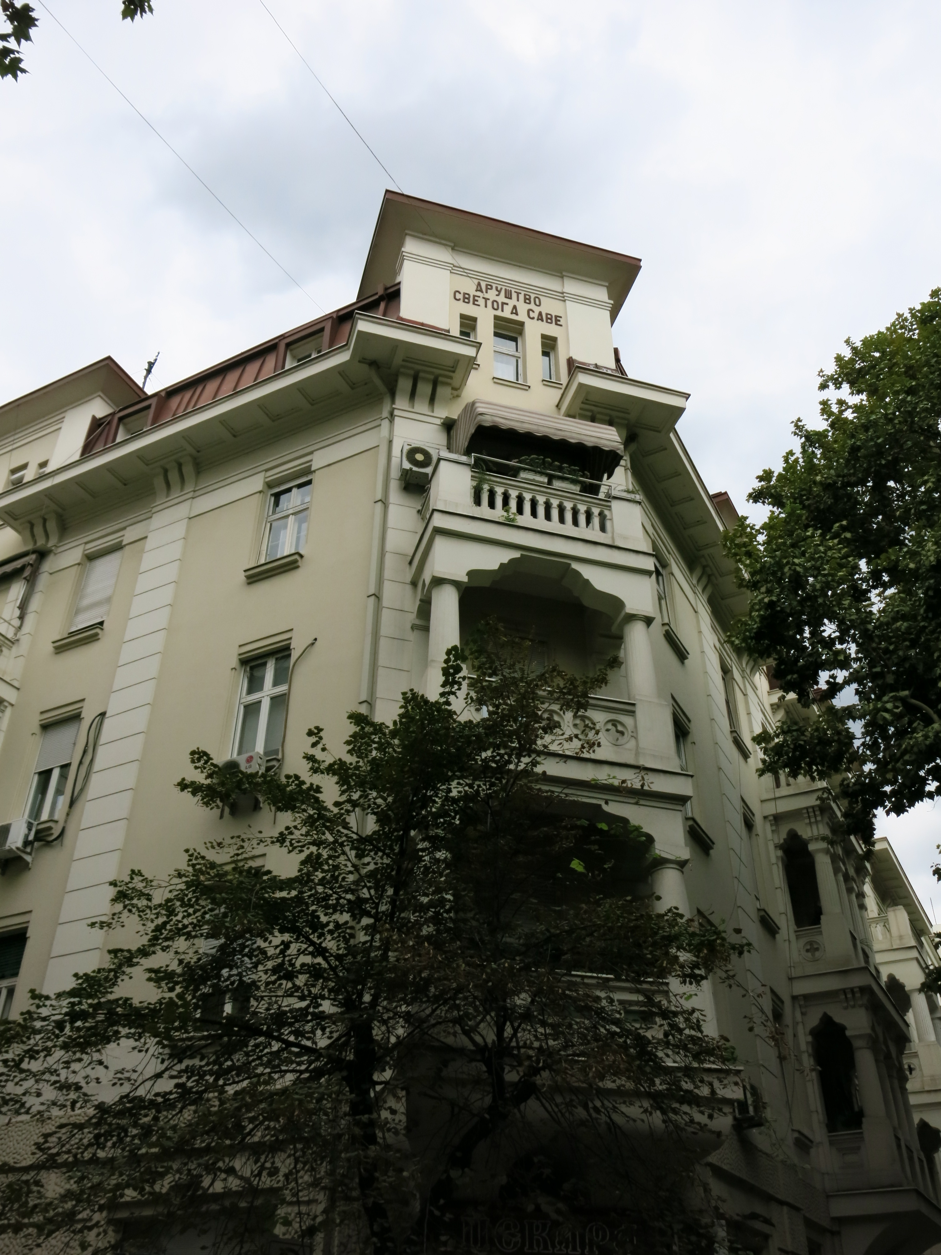 Зграда Друштва светог Саве